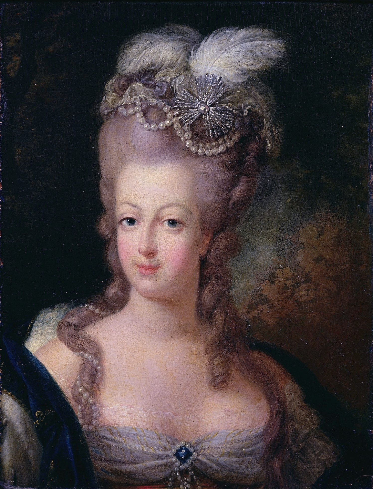 Marie Antoinette (1755-1793) Portresi